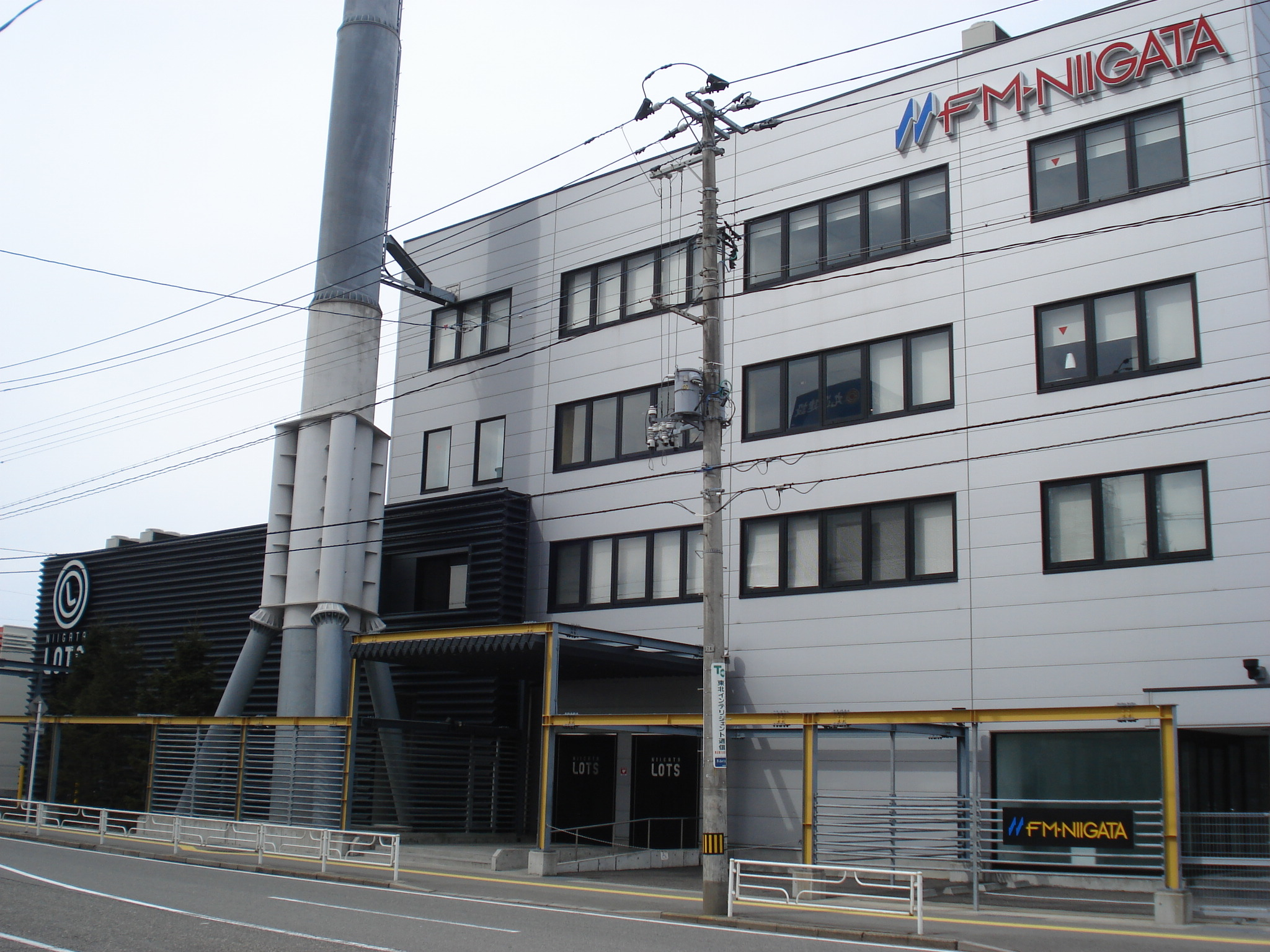 エフエムラジオ新潟 本社社屋（NIIGATA LOTS） 新潟県新潟市中央区幸西4丁目